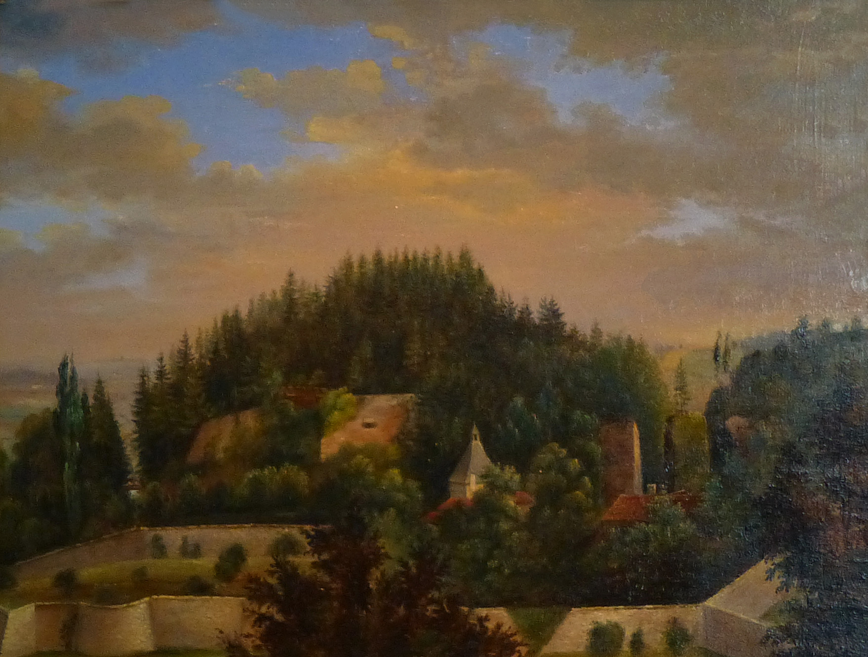 Antoine Dutac (1787-1857), Vue du château d'Epinal, Musée départemental d'art ancien et contemporain d'Epinal.